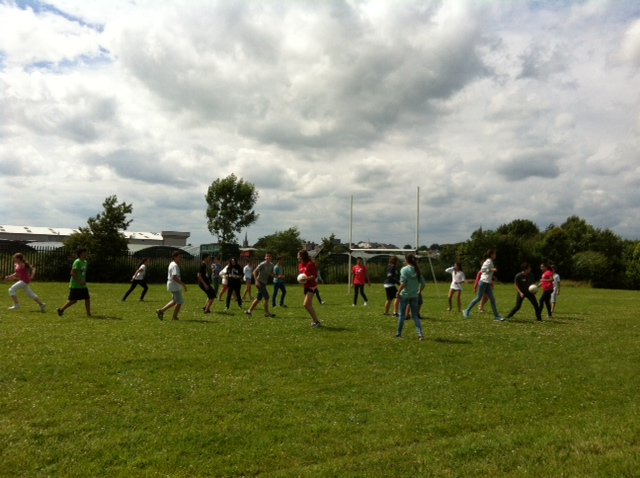 Jóvenes participantes de un campamento de verano en el extranjero.